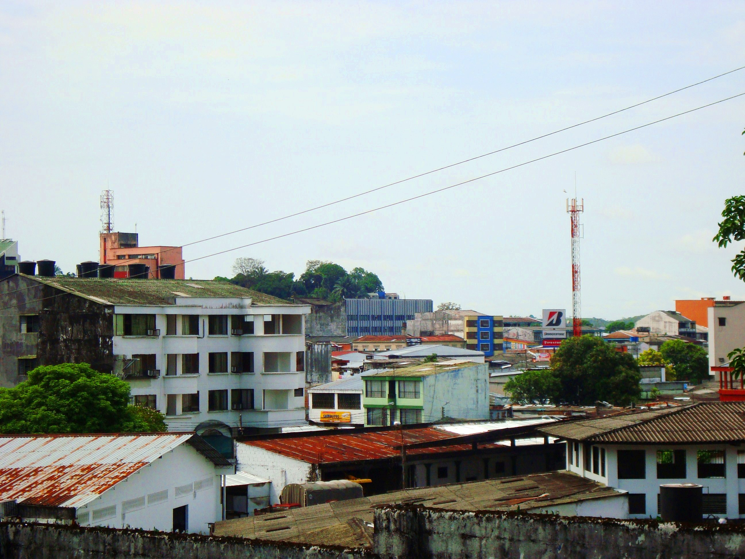 Panorámica centro de Florencia